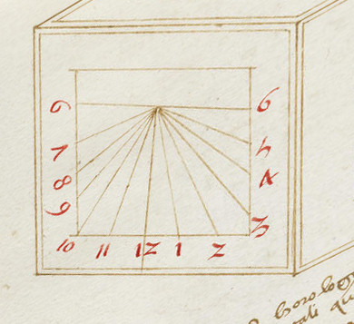 Cadran solaire méridional d'après manuscrit allemand inconnu